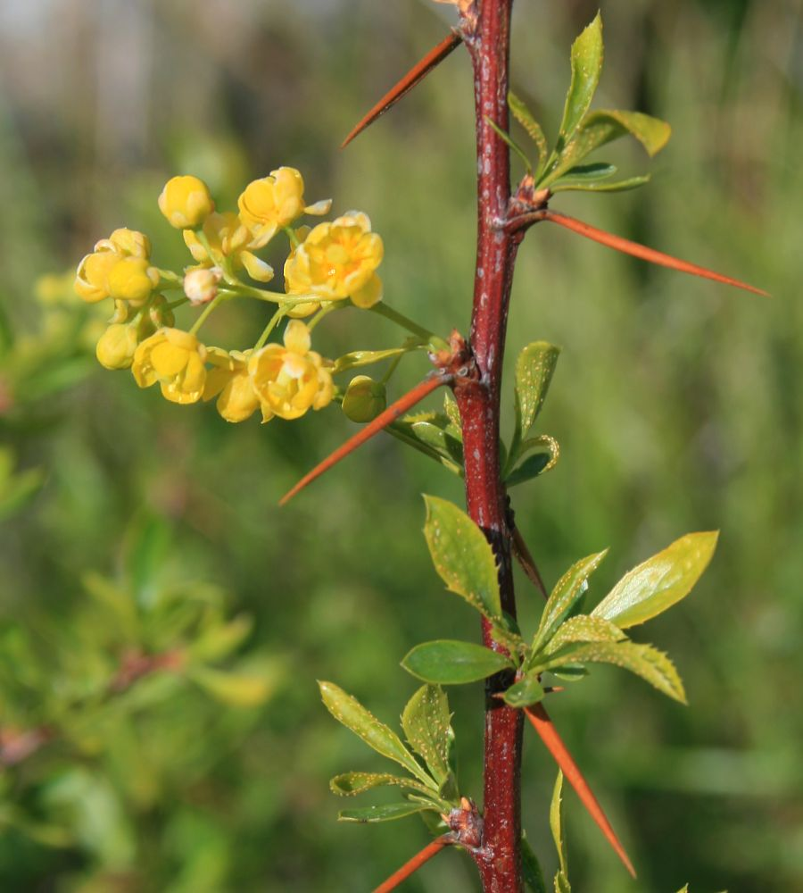 Berberis crataegina, Berberitzengewächse (Berberidaceae) - Türkei/Türkiye/Turkey: Prov. Bolu/Bolu ili, Köroğlu Dağları, an der Straße zwischen der Sommersiedlung Kızgölcük Yaylası und Kıbrıscık